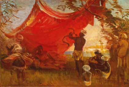 Szenenentwurf zu "Paulus", Szenisches Oratorium (Mendelssohn-Bartholdy) - Ananias; Düsseldorf 1870; Öl auf Leinwand; 32 x 48 cm; Theaterwissenschaftliche Sammlung der Universität zu Köln (Schloss Wahn), Inv.-Nr. 1535 b